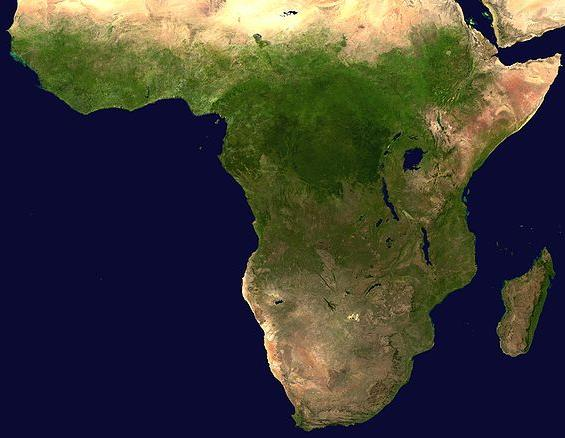 Mapa satelital del África Subsahariana